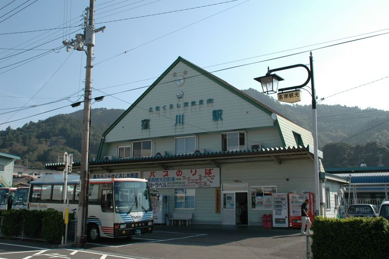 TosaKuroshio Railway kubokawa STA. photo by (2005.9.19)